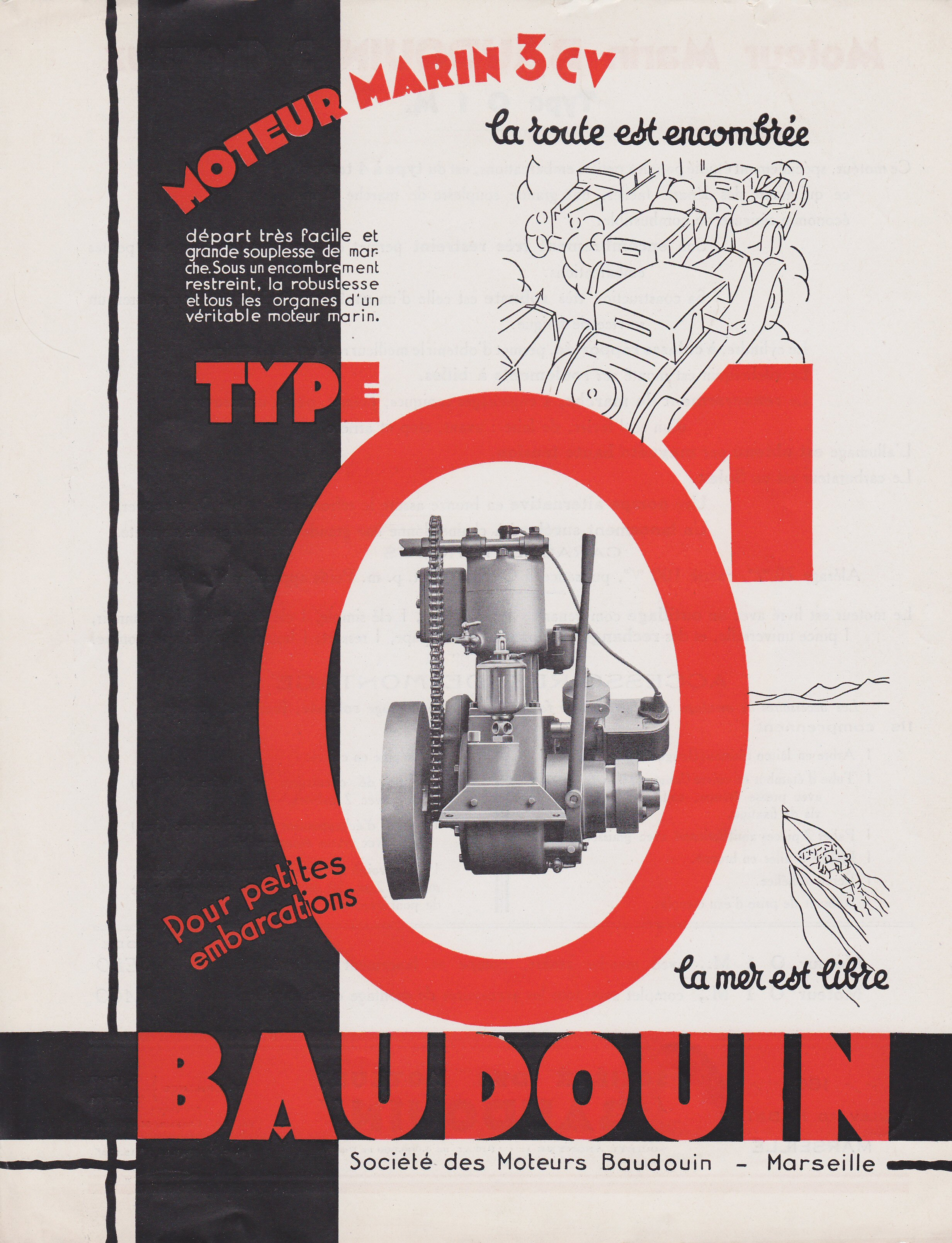 Fiche publicitaire BAUDOUIN O1